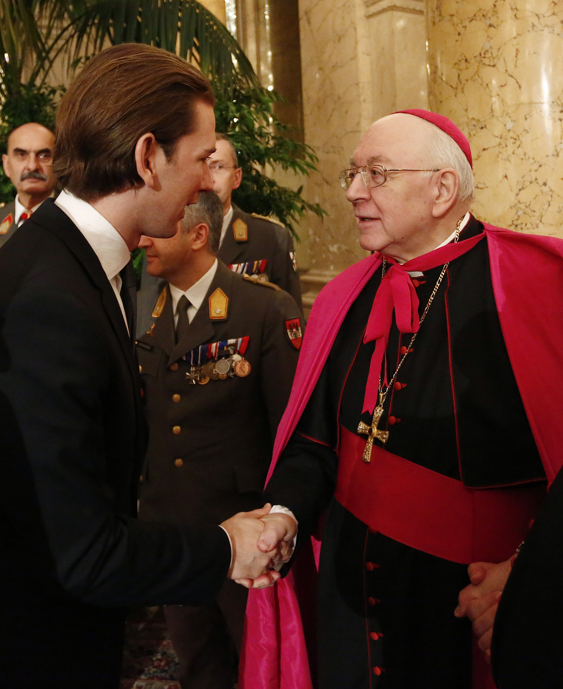 Neujahrsempfang für das Diplomatische Corps. Hofburg, Wien, 12.01.2015, Foto: Dragan Tatic